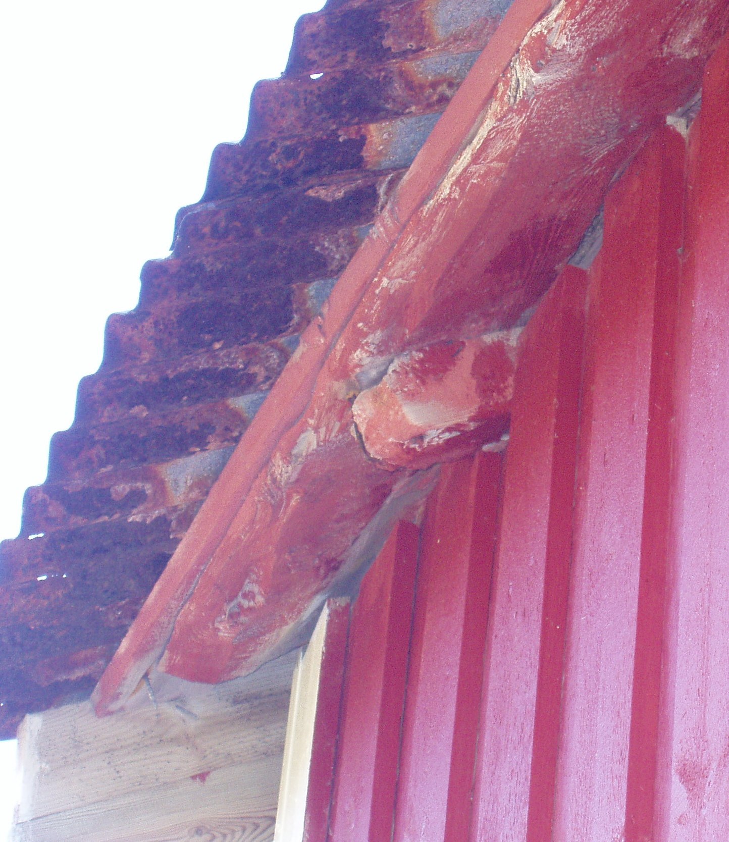 Skaftunge fotografert utanfrå